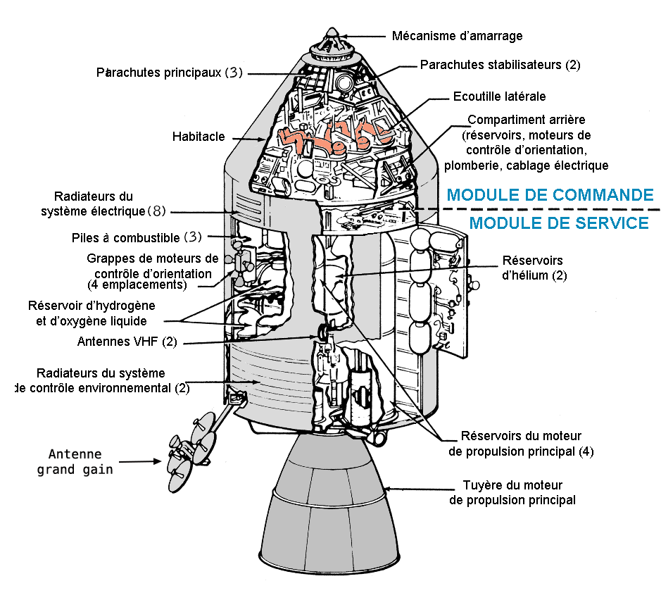 Schéma en français du vaisseau Apollo